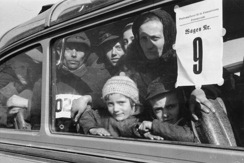 Wartheland, Ankunft von Umsiedlern Wartheland - Ansiedlung Ansiedlung dt. Bauern aus Ostpolen [Reichsgau Wartheland.- Ankunft deutschstämmiger Bauern aus Ostpolen in einem Autobus.]